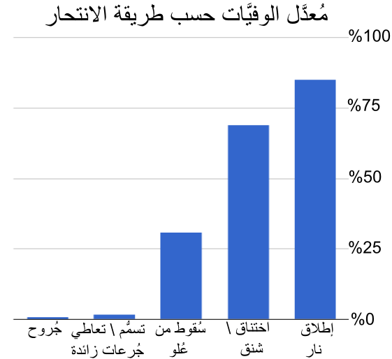 مُعدلات حالات الانتحار حسب الوسيلة في الولايات المُتحدة الأمريكيَّة.